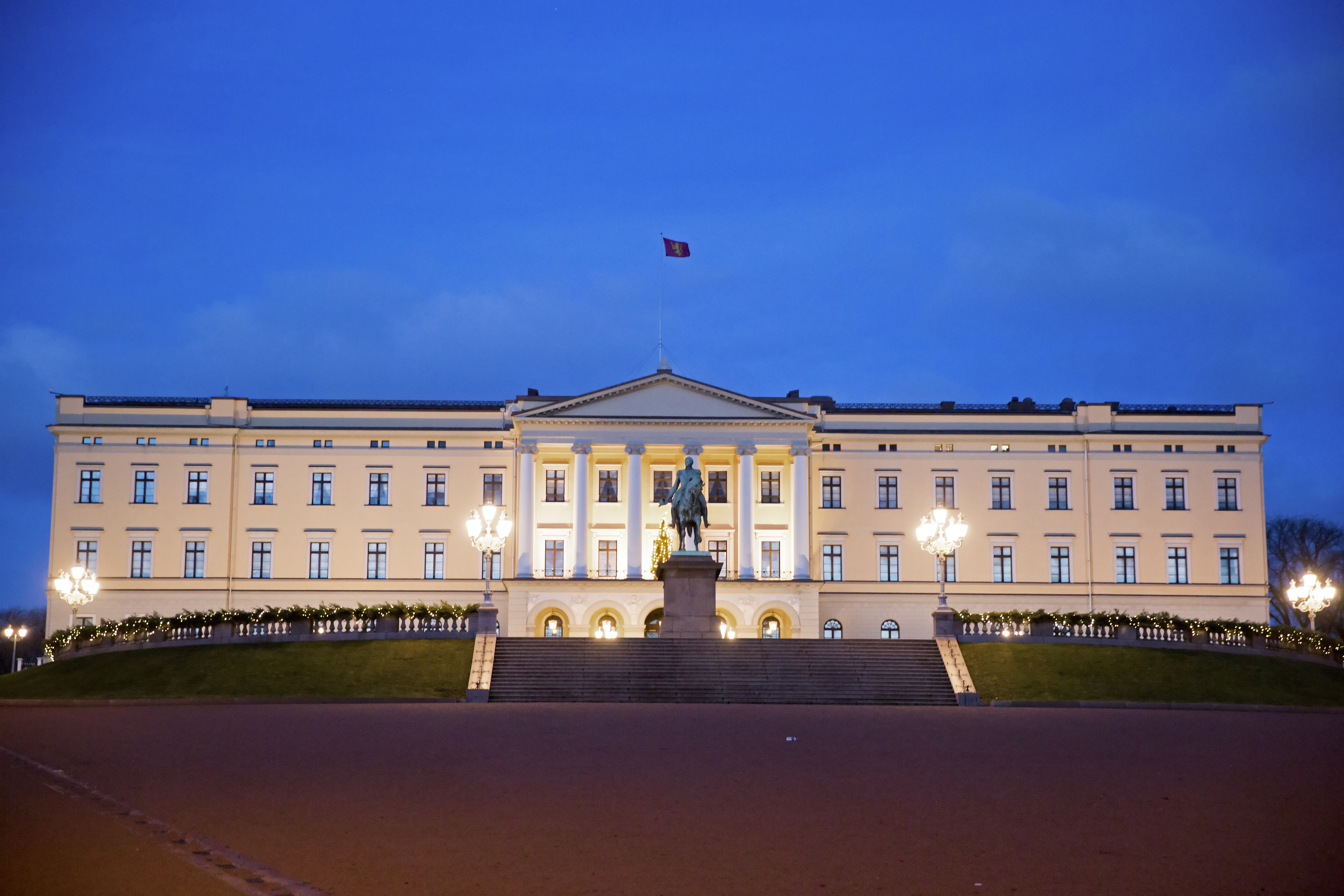 Oslo - December 2013